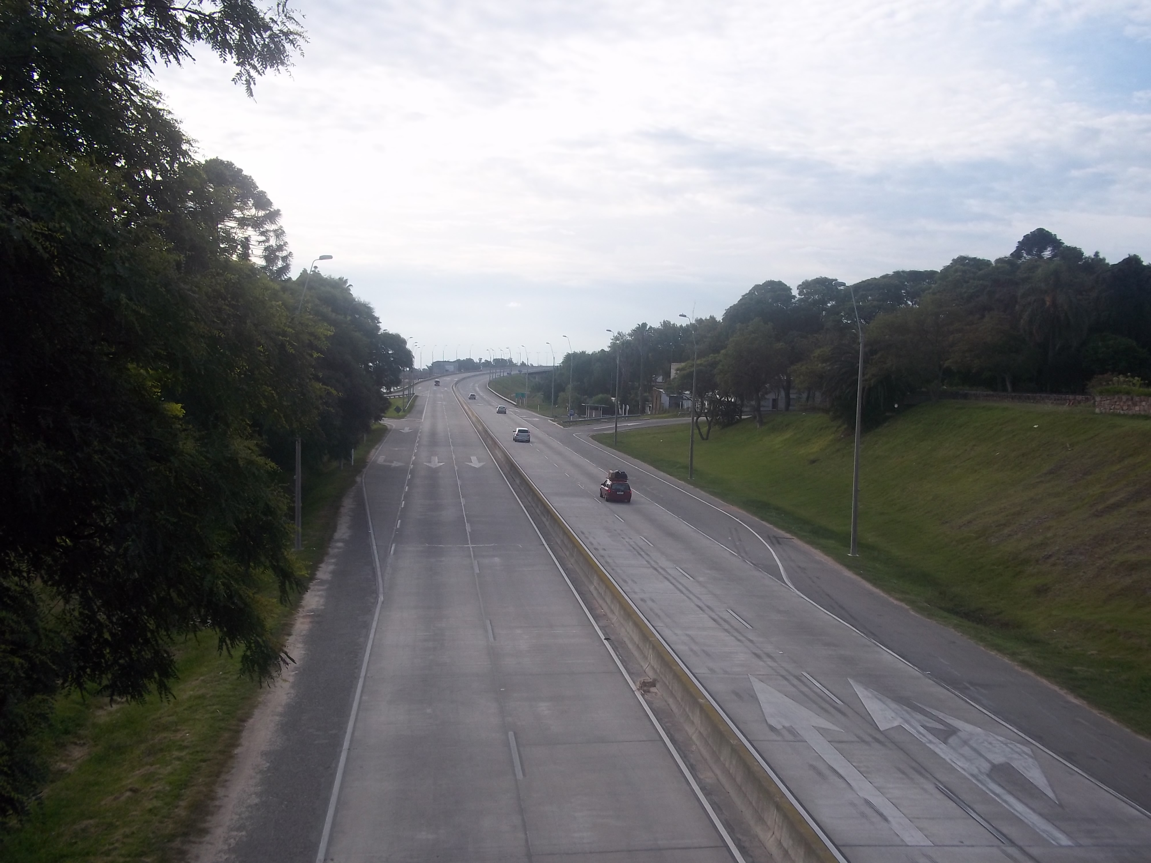 View of Road 1 pointing to San José from a bridge in Parque Segunda República, Santiago Vázquez, Montevideo, Uruguay.